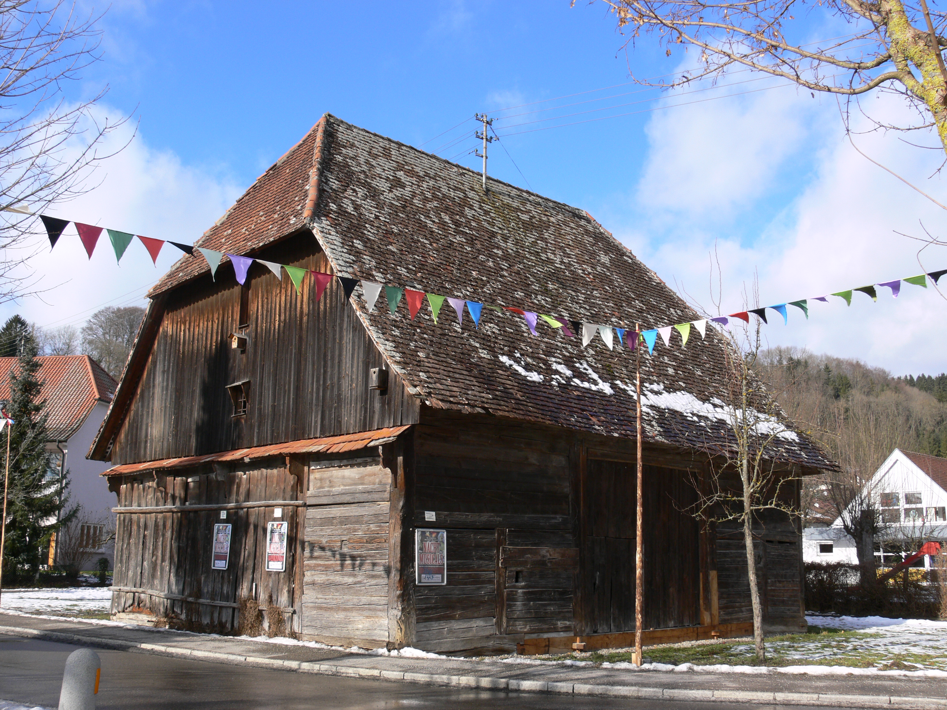 Staig, Ortsteil von Fronreute, Kreis Ravensburg, Baden-Württemberg, Deutschland Zehntstadel